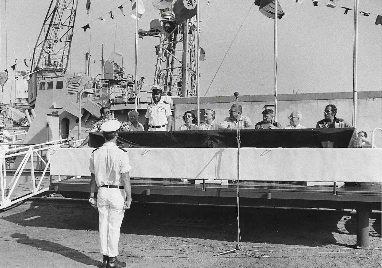 רס"ן אלכס אייל מקבל את הספינה בטקס השקתה של אח"י נצחון 10 ביולי 1978.